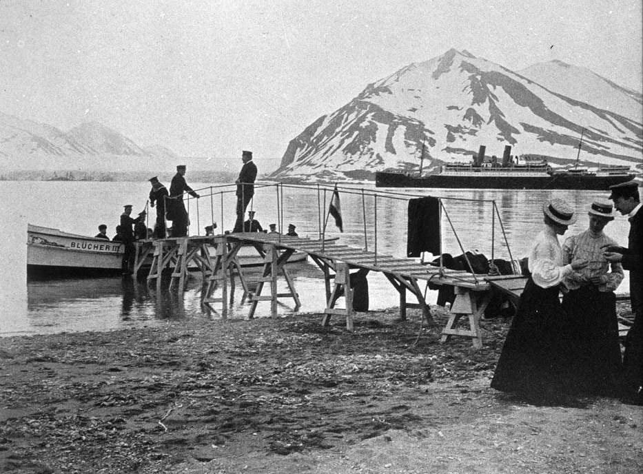 Lluís Llagostera i Pascual